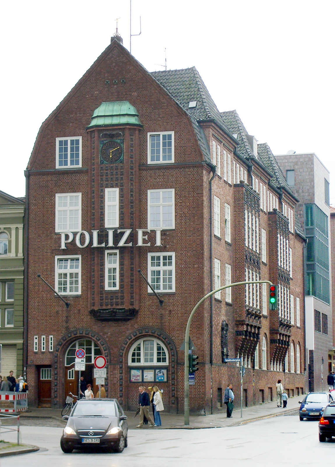 Die Davidwache in Hamburg St. Pauli, erbaut von Fritz Schumacher. This is a photograph of an architectural monument.